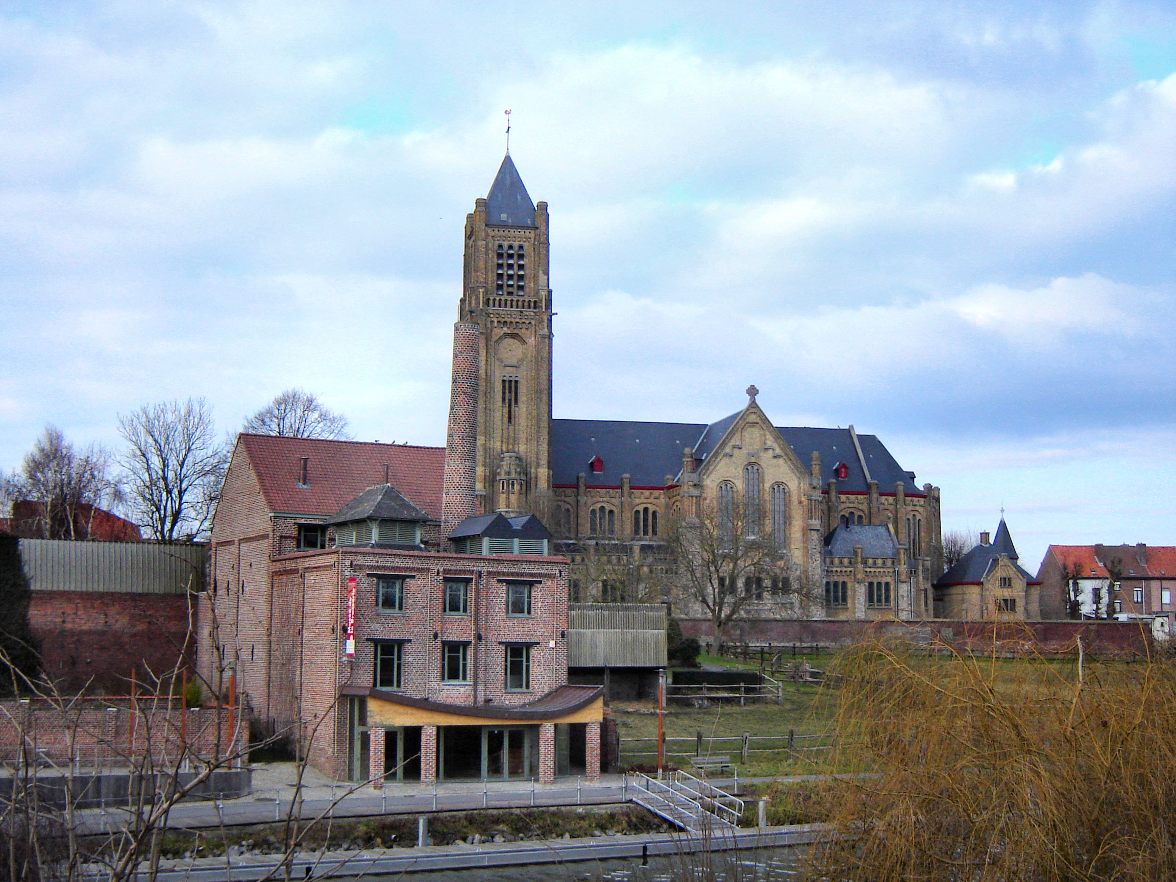 Zicht op centrum van Waasten aan de Leie, met de Église Saints Pierre et Paul en het Musée de la Brasserie.